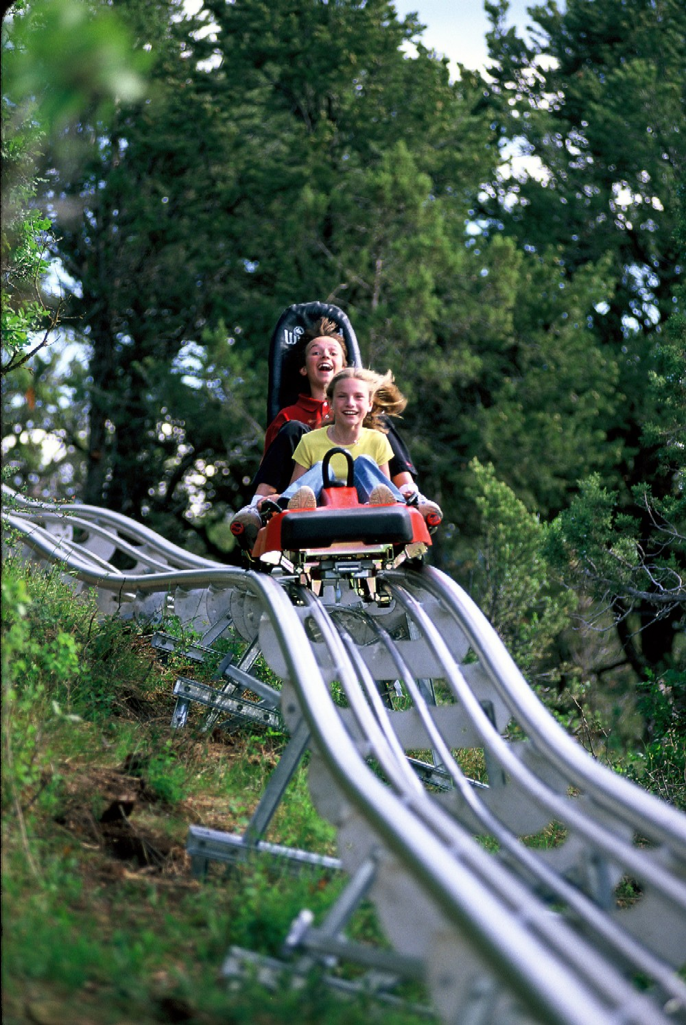 Eifel-Coaster (Allwetter-Rodelbahn)